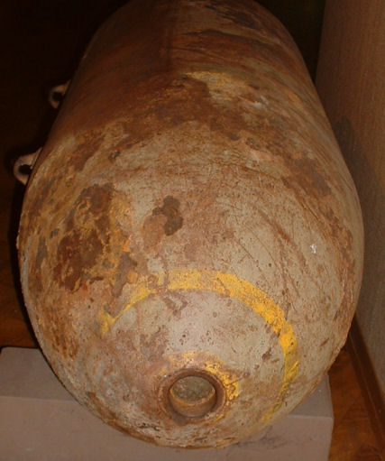 Beschreibung: amerikanische 10-Zentner-Bombe AN-M 65 aus dem Zweiten Weltkrieg in Ludwigshafen am Rhein (Stadtmuseum)